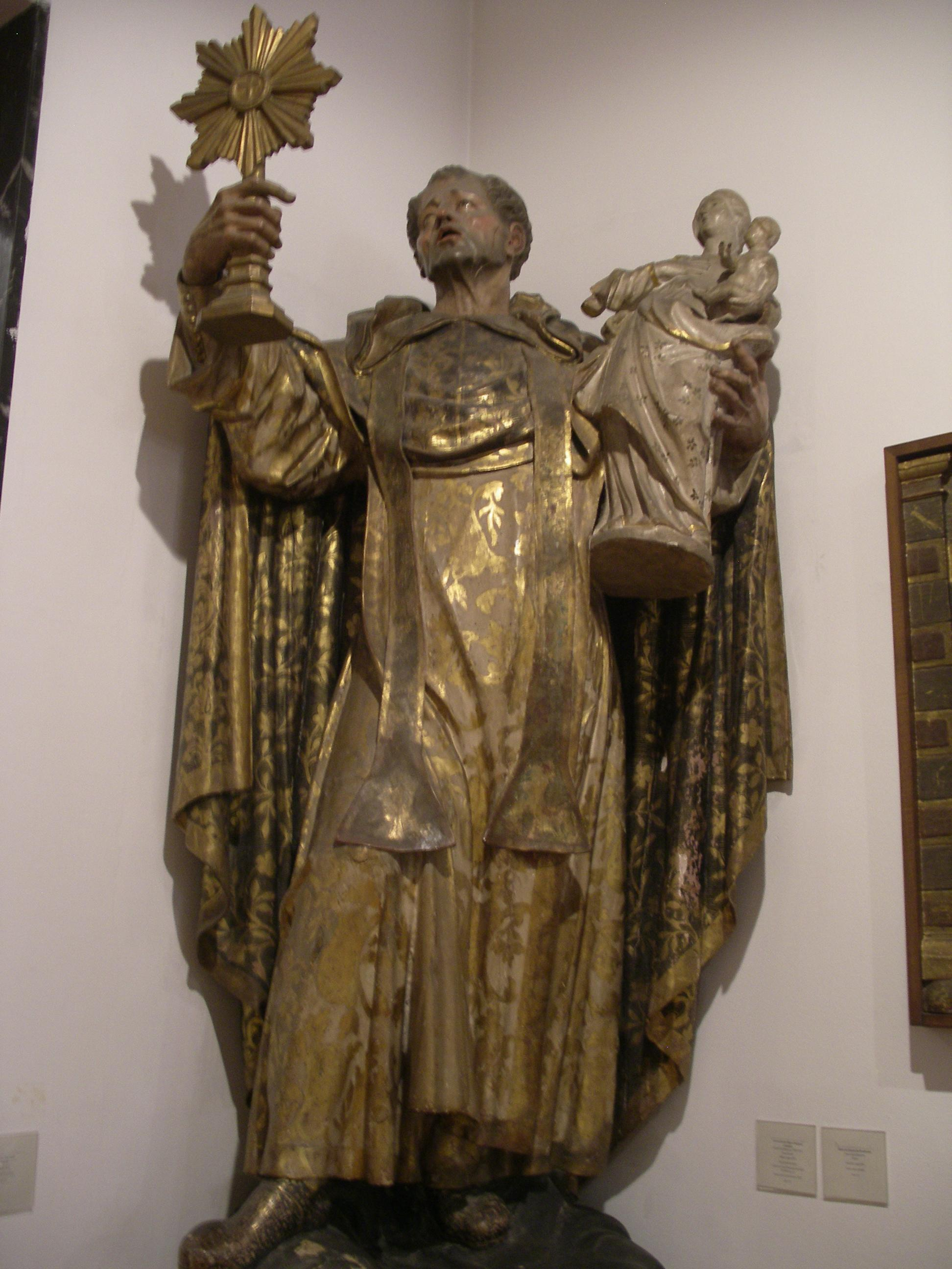 Sant Jacint, talla del s. XVII (Barcelona, Museu Marès)